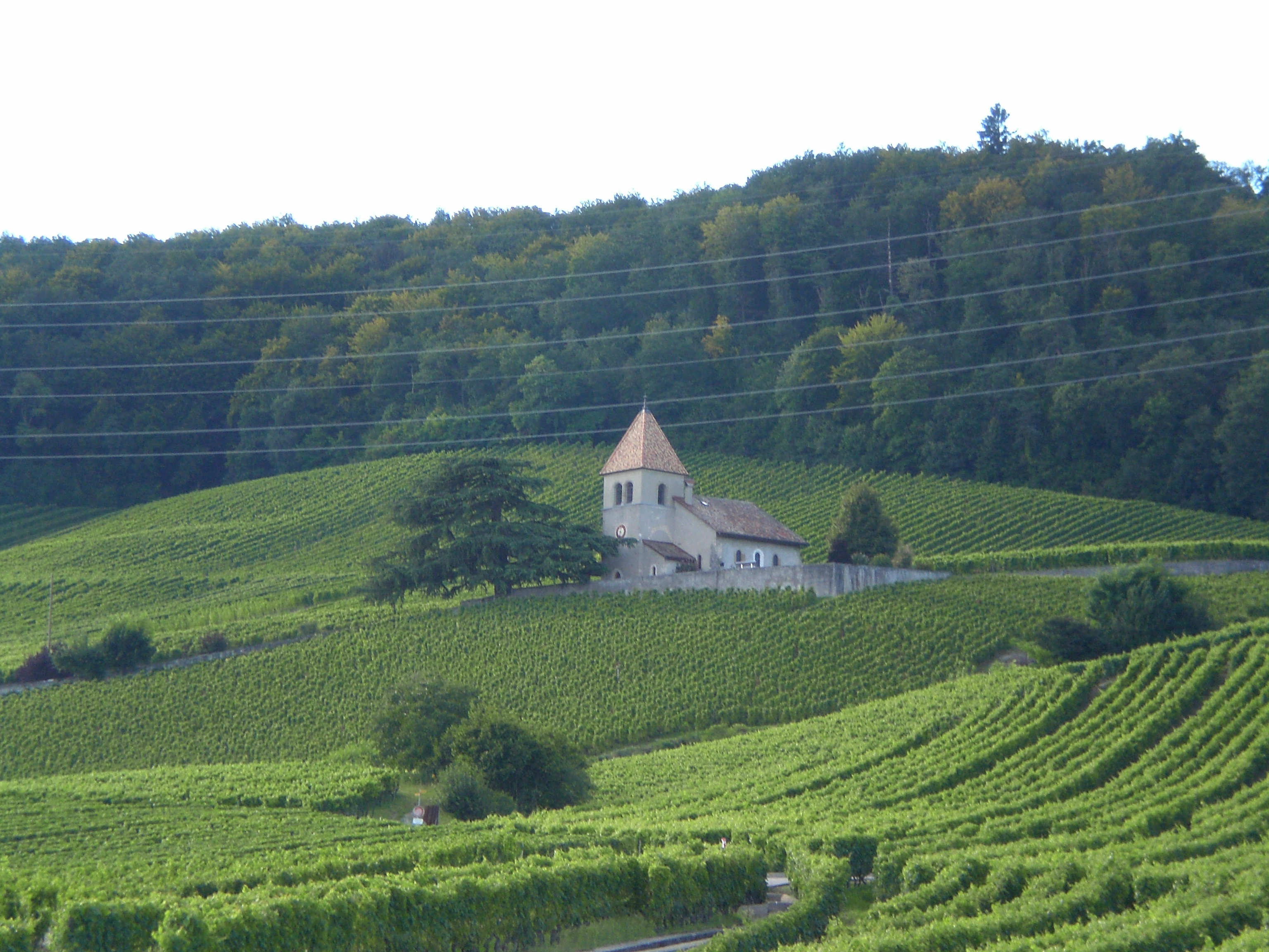 Chapelle de Luins, dans les vignes